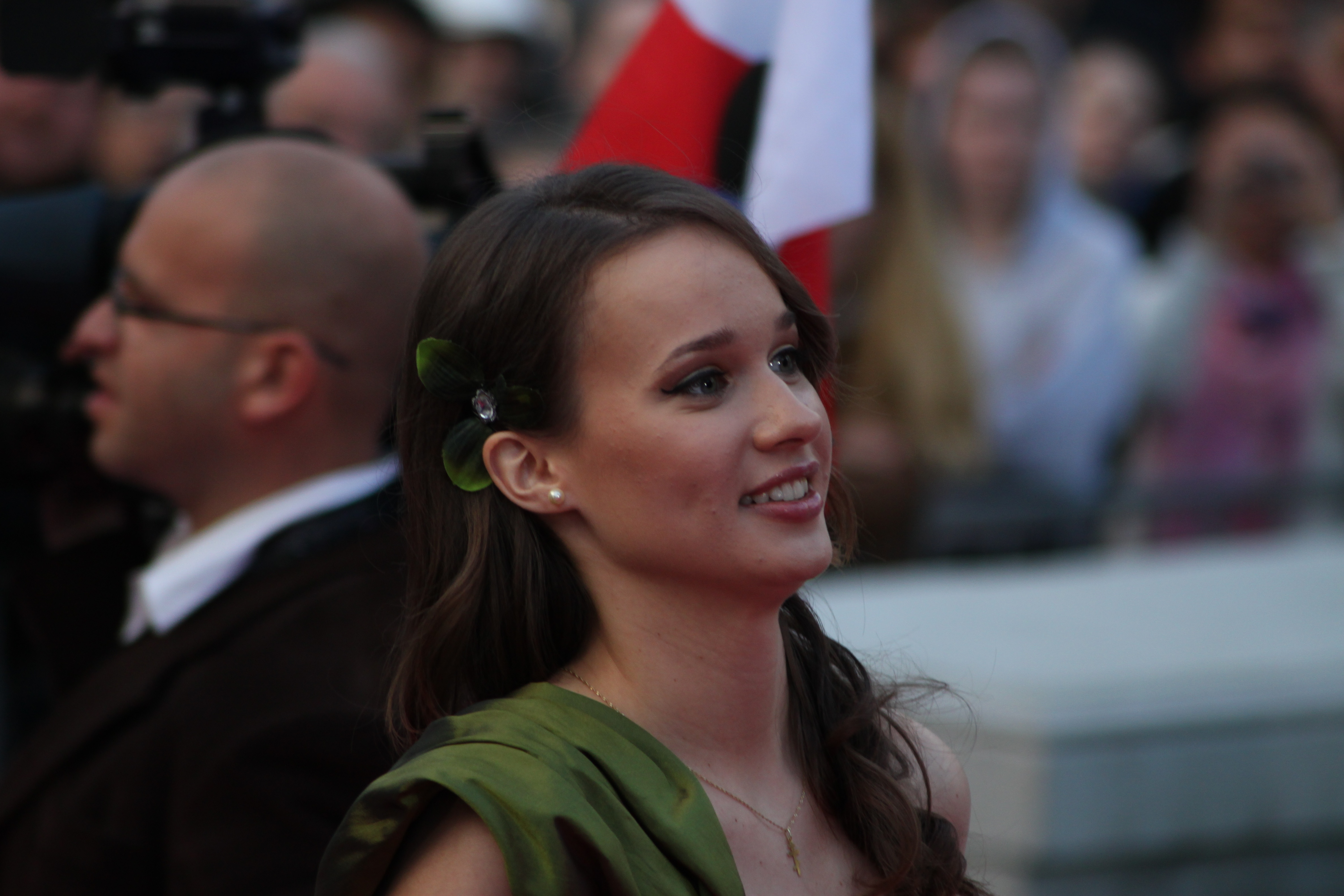 Foto: Vincent Hasselgård, Aktiv I Oslo.no